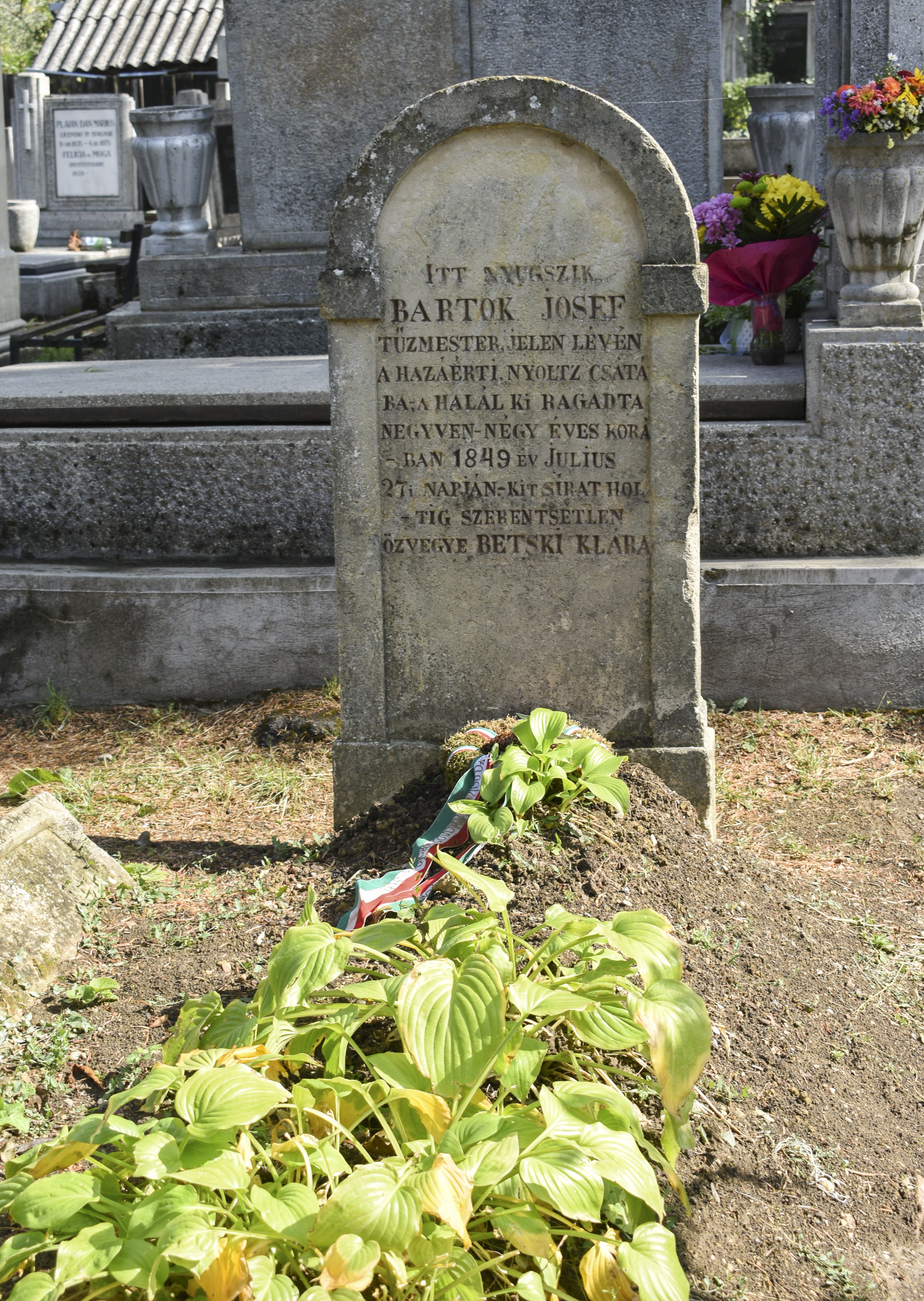 Mormânt Bartók József (1805-1849) 129